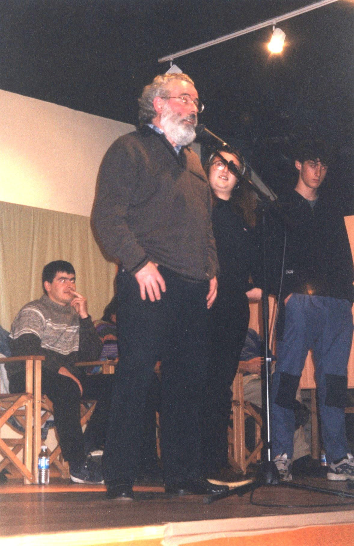 Xabier Amuriza, Estitxu Arozena eta Amets Arzallus Santa Fe jaietako bertso-saioan 2000. urtean